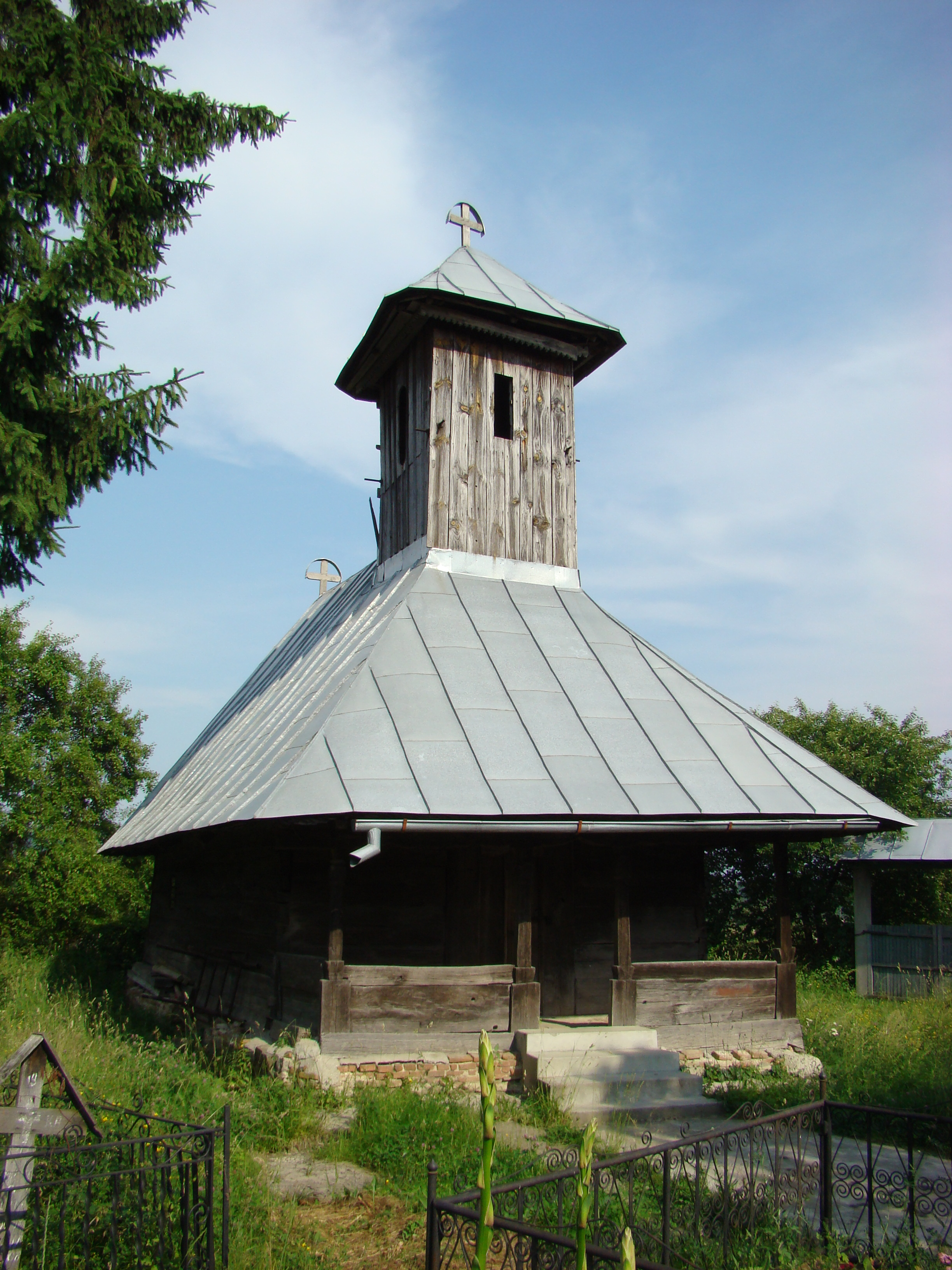 Biserica de lemn „Sf.Nicolae” din Mănăilești-Moșteni